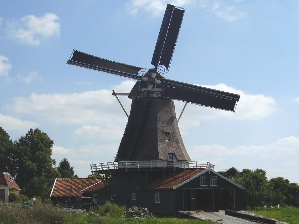 Bolwerksmolen in Deventer, the Netherlands